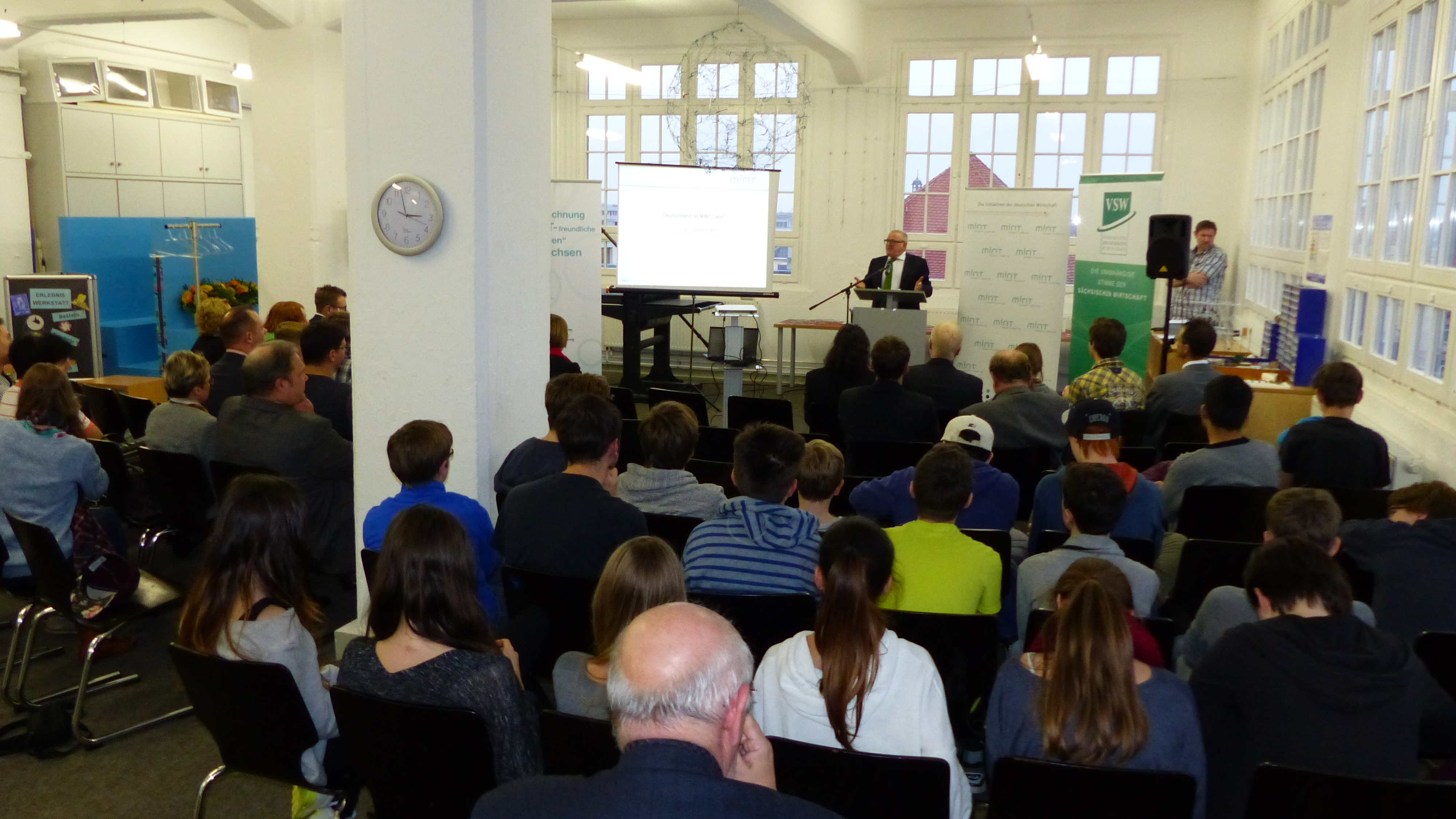 Preisverleihung im Rahmen der Wirtschaftsinitiative "MINT Zukunft schaffen" in Sachsen 2014 in den "Technischen Sammlungen Dresden" am 24.11.2014